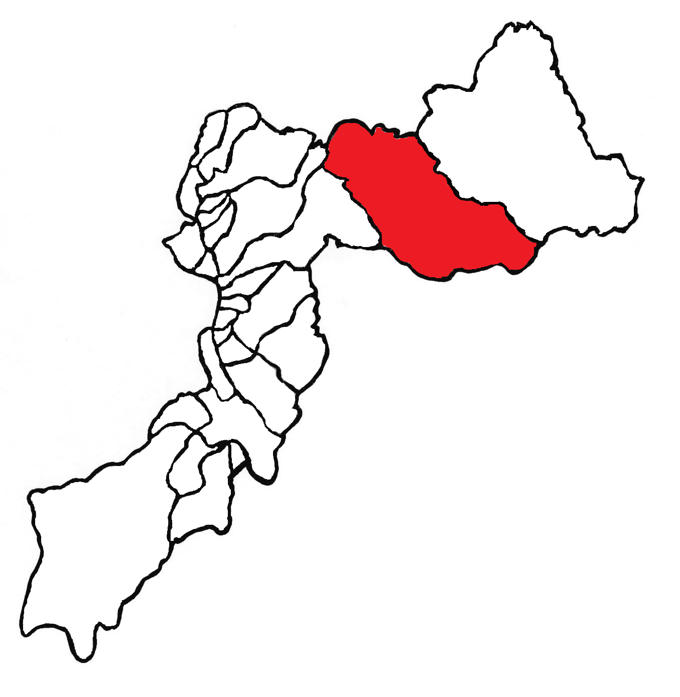 Ubicación del distrito en la provincia de Huancayo, departamento de Junín, Perú